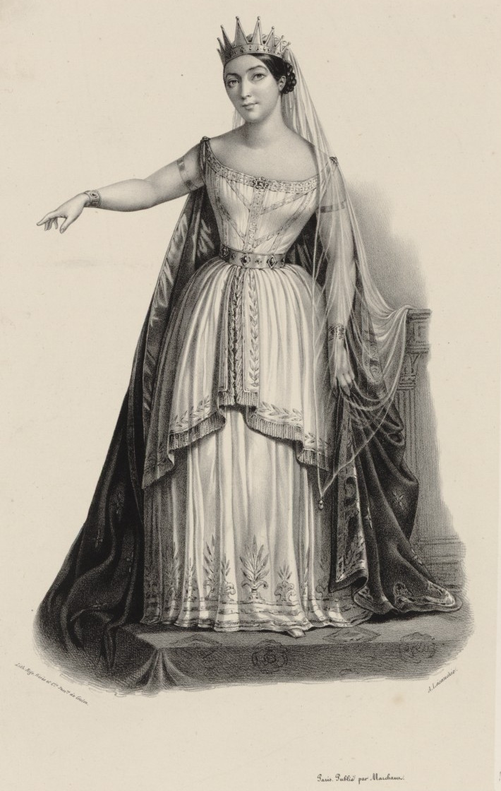 Giulia Grisi as Semiramide in the opera Semiramide